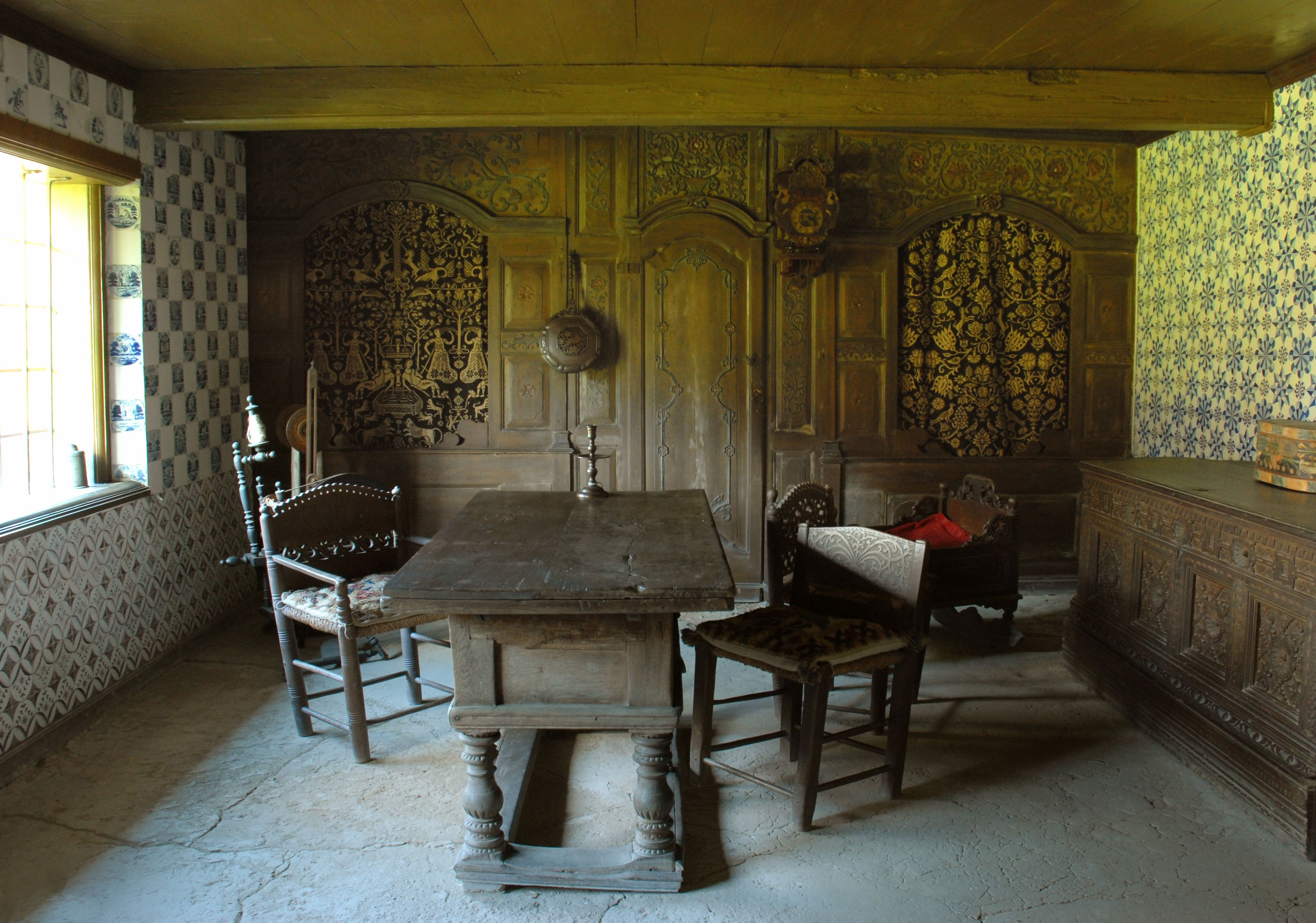 Dørns, Ostenfeld. Langbord med drejede, udskårne armstole omkring. Frisisk/hollandske fliser på væggene